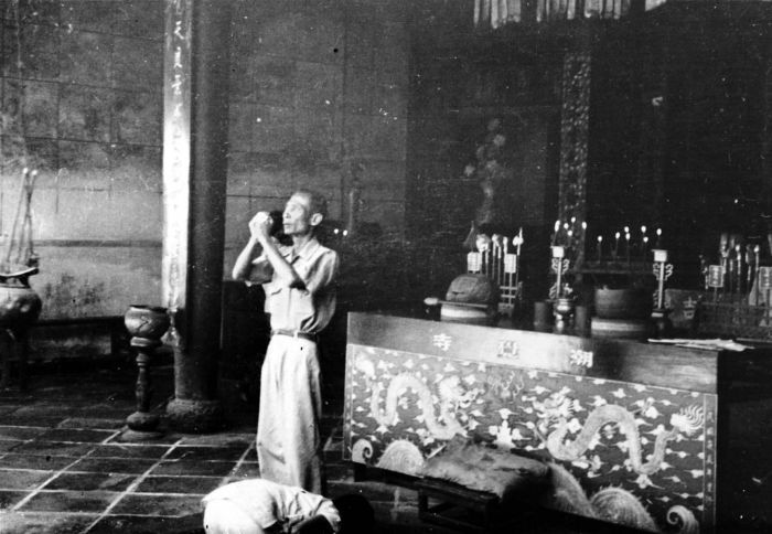 Repronegatief. Biddende Chinezen in een Chinese tempel te Cheribon, West-Java.